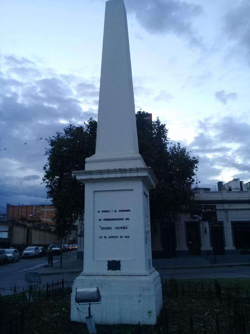 Al sacrificio del pueblo jujeño y del general Manuel Belgrano